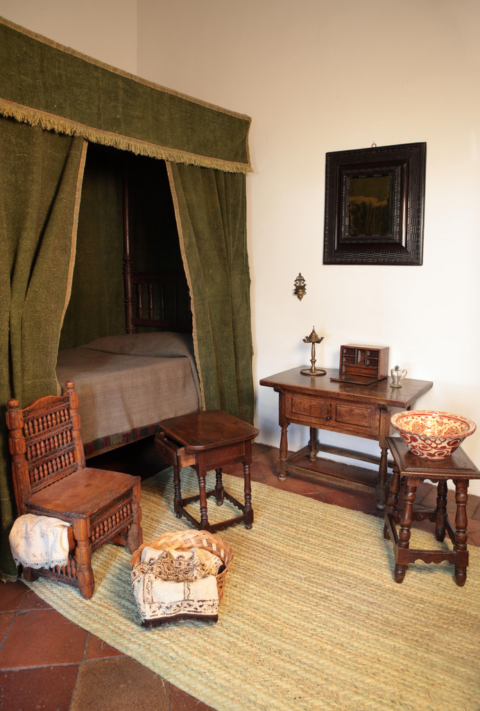 Apostento de las hijas de Lope de Vega en la Casa Museo de Lope de Vega, en Madrid (España).